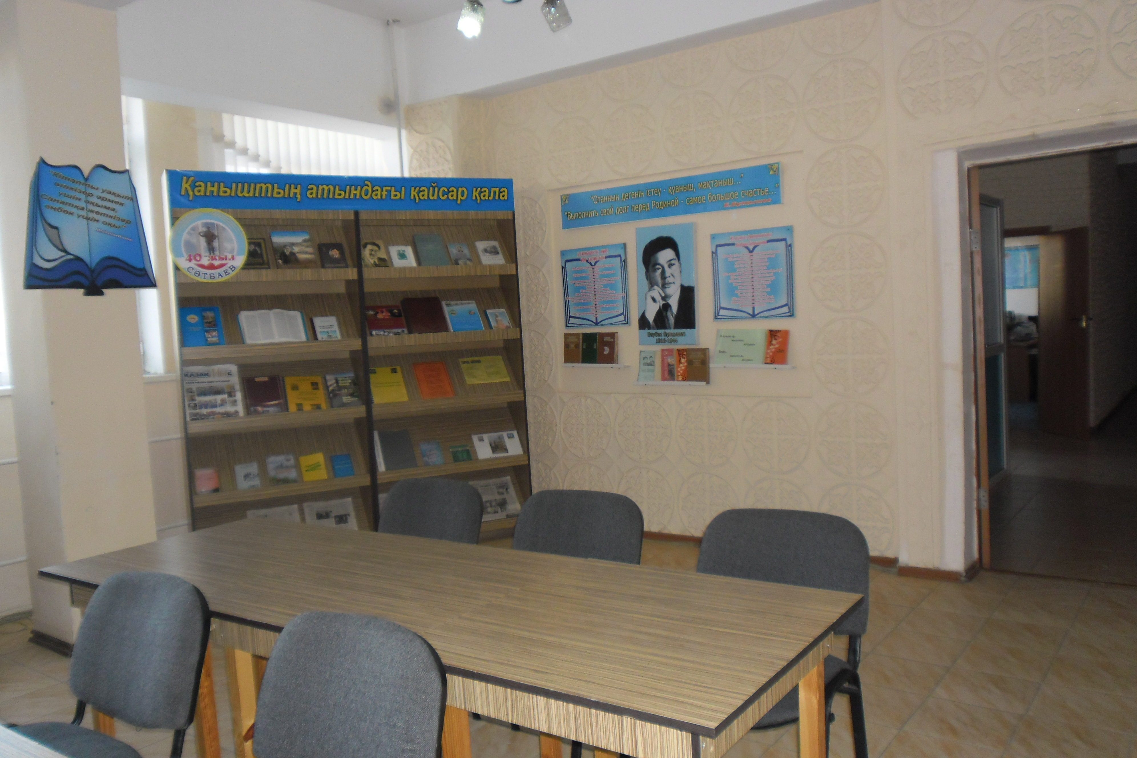 кітапхана